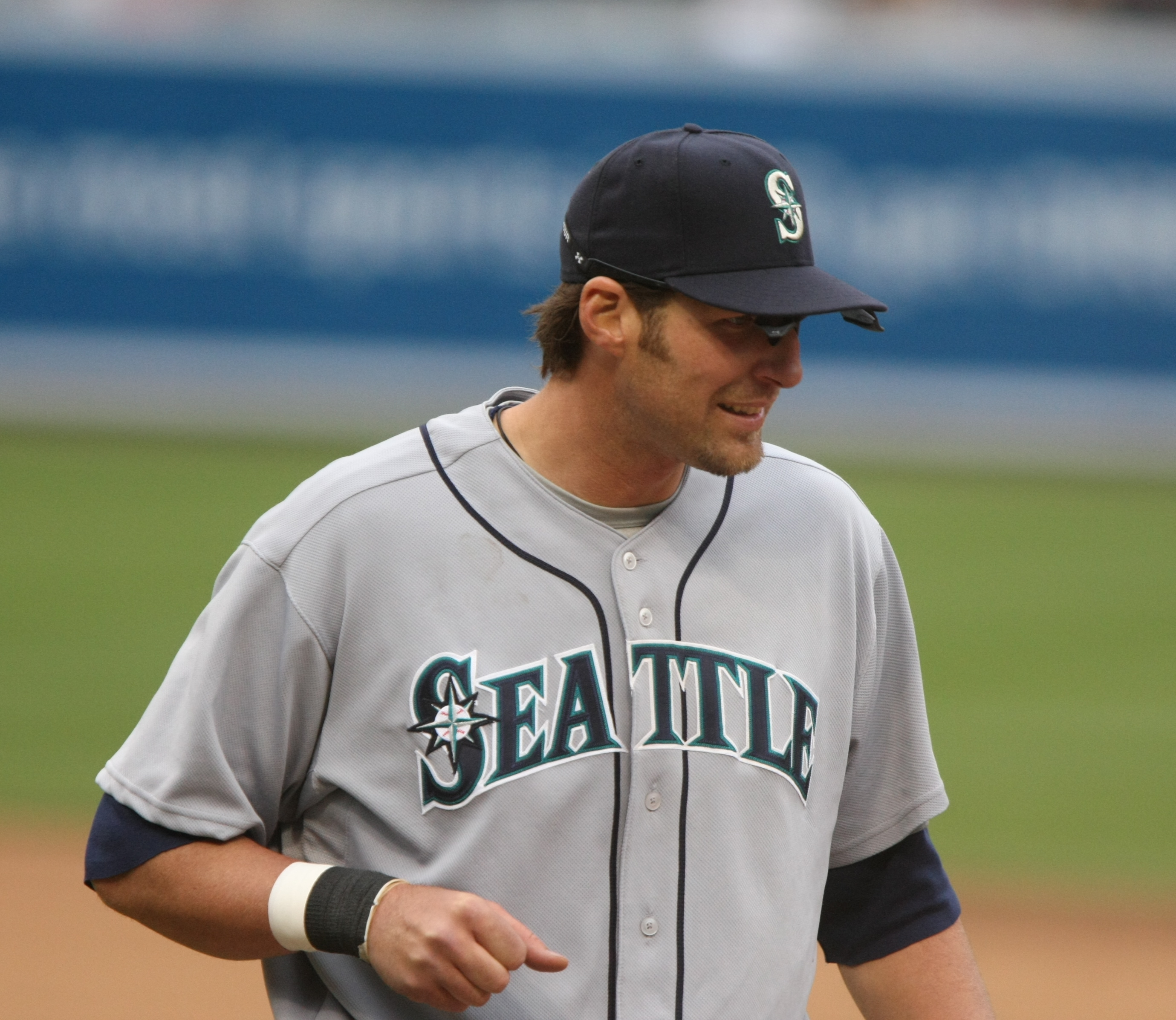 Richie Sexson